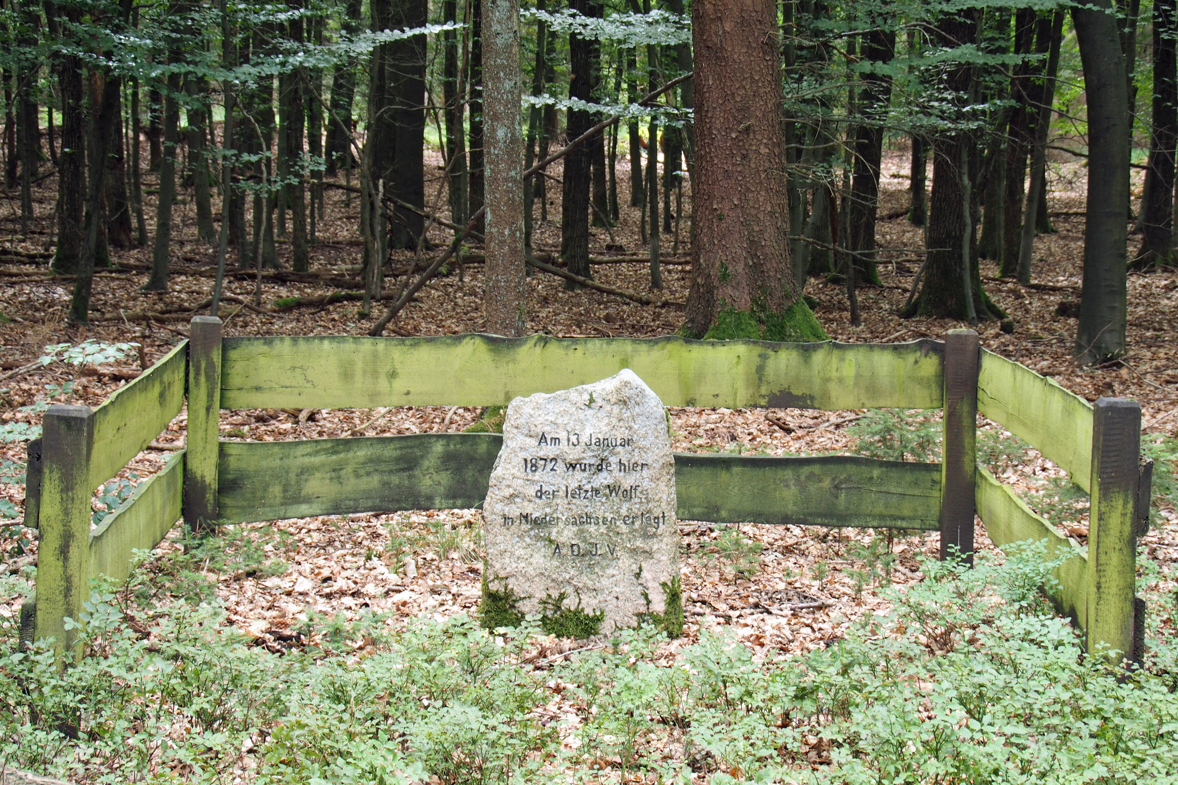 Wolfsstein im Becklinger Holz, Truppenübungsplatz Bergen. Hier wurde 1872 der letzte Wolf in Niedersachsen geschossen